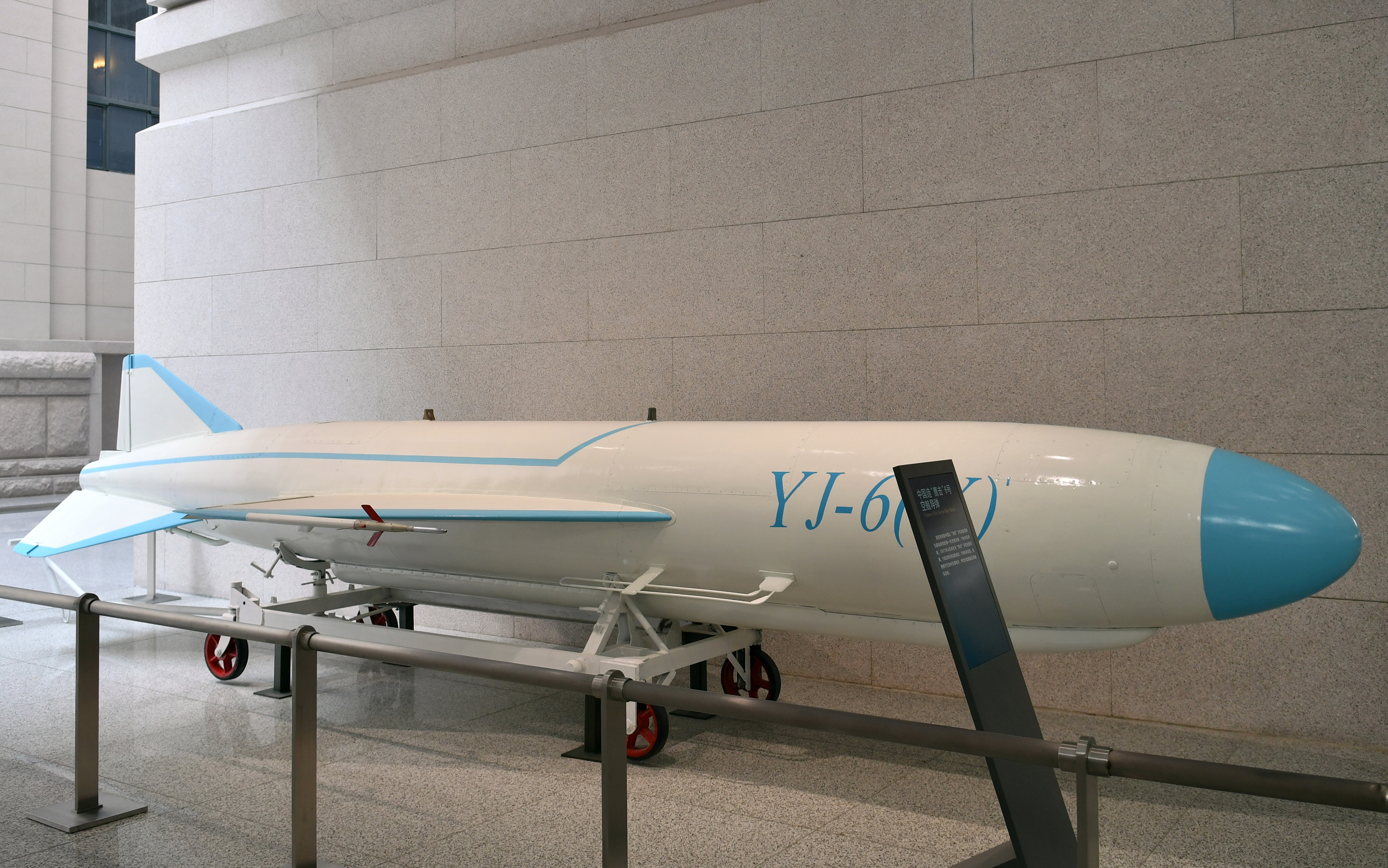 “鹰击”6号空舰导弹，拍摄于中国人民革命军事博物馆。